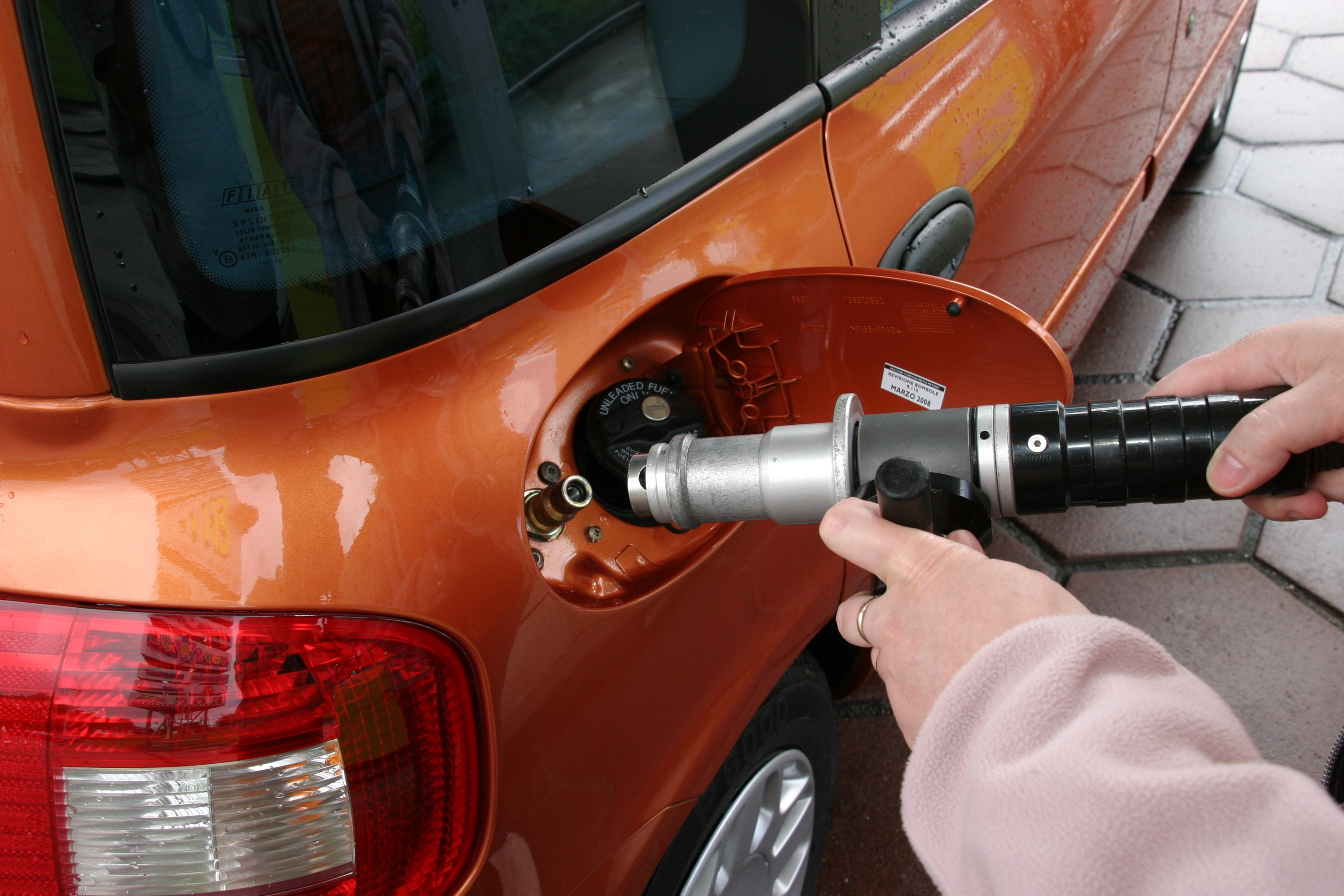 Filling up natural gas (Fiat Multipla)